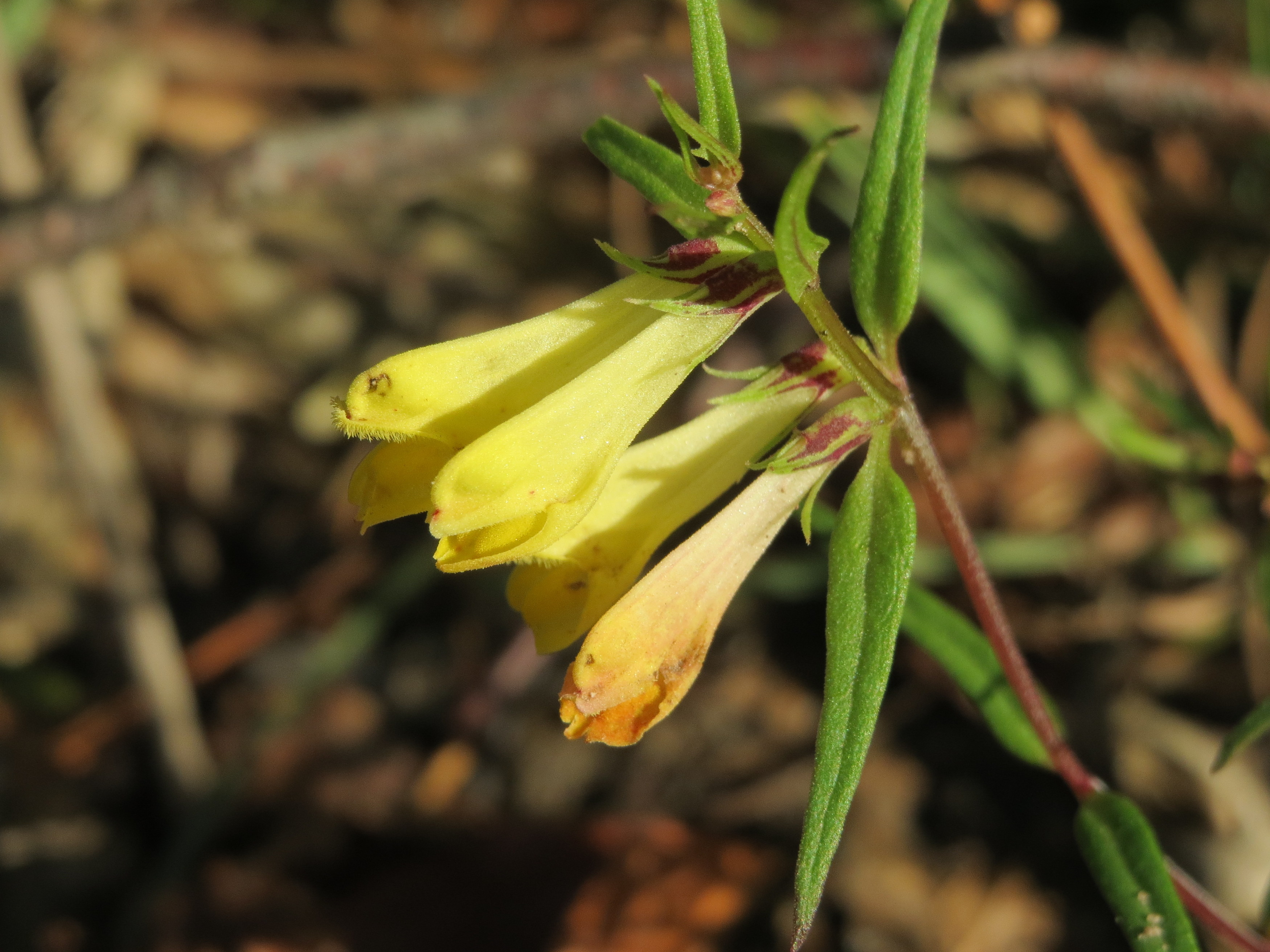 Wiesen-Wachtelweizen (Melampyrum pratense) im Schwetzinger Hardt